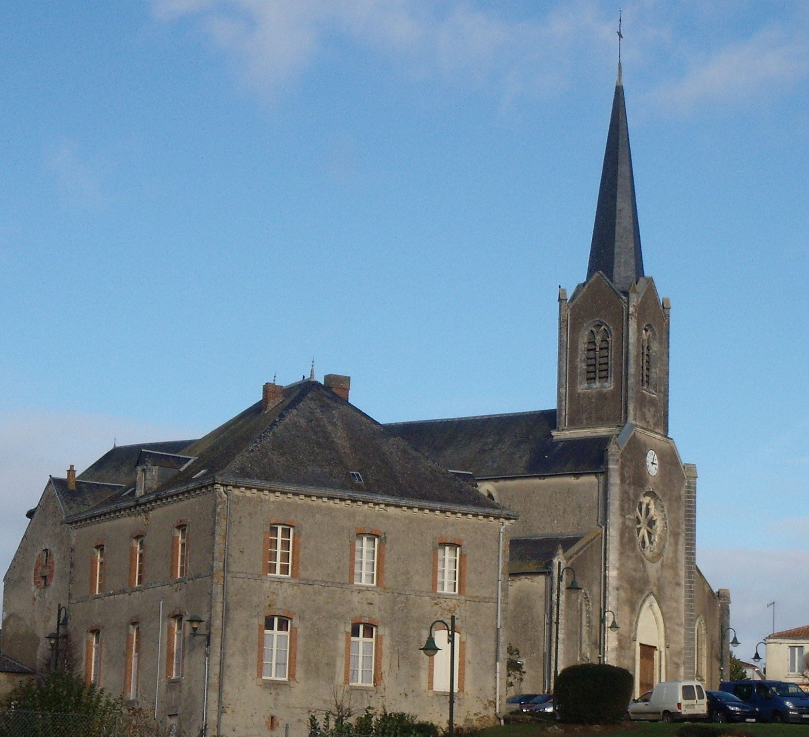 Eglise et presbytère